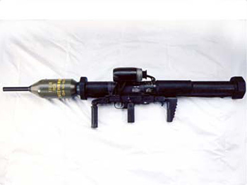 略称：LAM [口径]60mm [全長]1,200mm [質量]13kg [弾丸質量]3.8kg [製作]IHIエアロスペース 操作、携行容易な無反動の対戦車火器である。（LAM＝Light Antiarmor Munition）